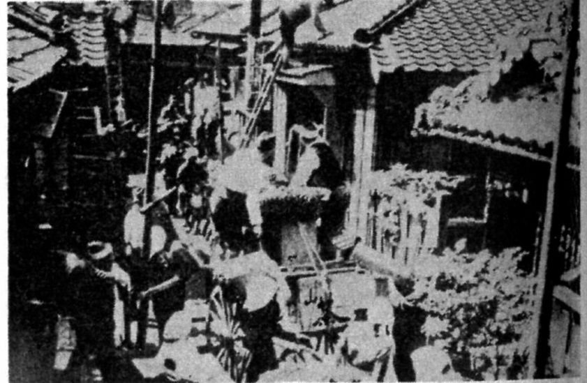 富山市の建物疎開